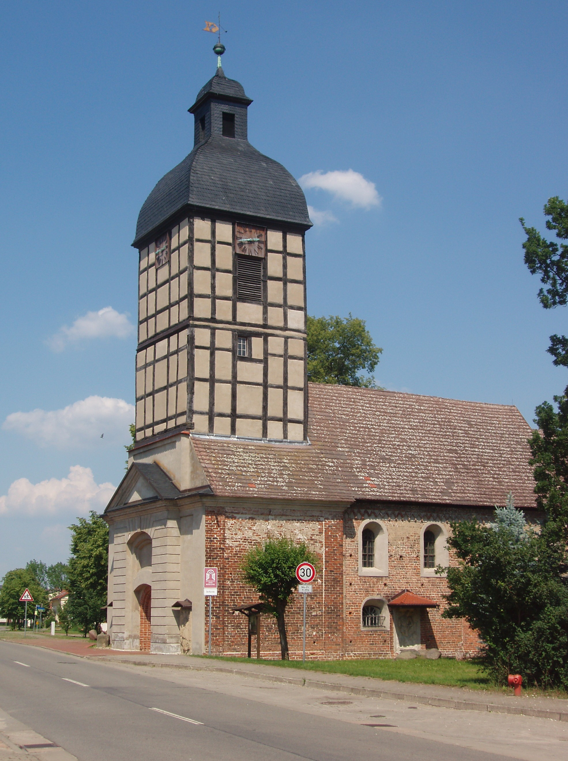 Spätromanische Backsteinkirche, erbaut zwischen 1191 und 1206, der markante Fachwerkturm wurde 1727 anstelle eines (zerstörten?) rechteckigen Wehrturms errichtet, Barockisierung im 17./18 Jahrhundert. Sarkophage der Familie von Katte befinden sich in einem Anbau, darunter der Holzsarg von Hermann von Katte, den König Friedrich Wilhelm I. hinrichten ließ, weil er mit seinem Sohn, dem späteren König Friedrich II., dem Alten Fritz, einen Fluchtversuch unternommen hatte